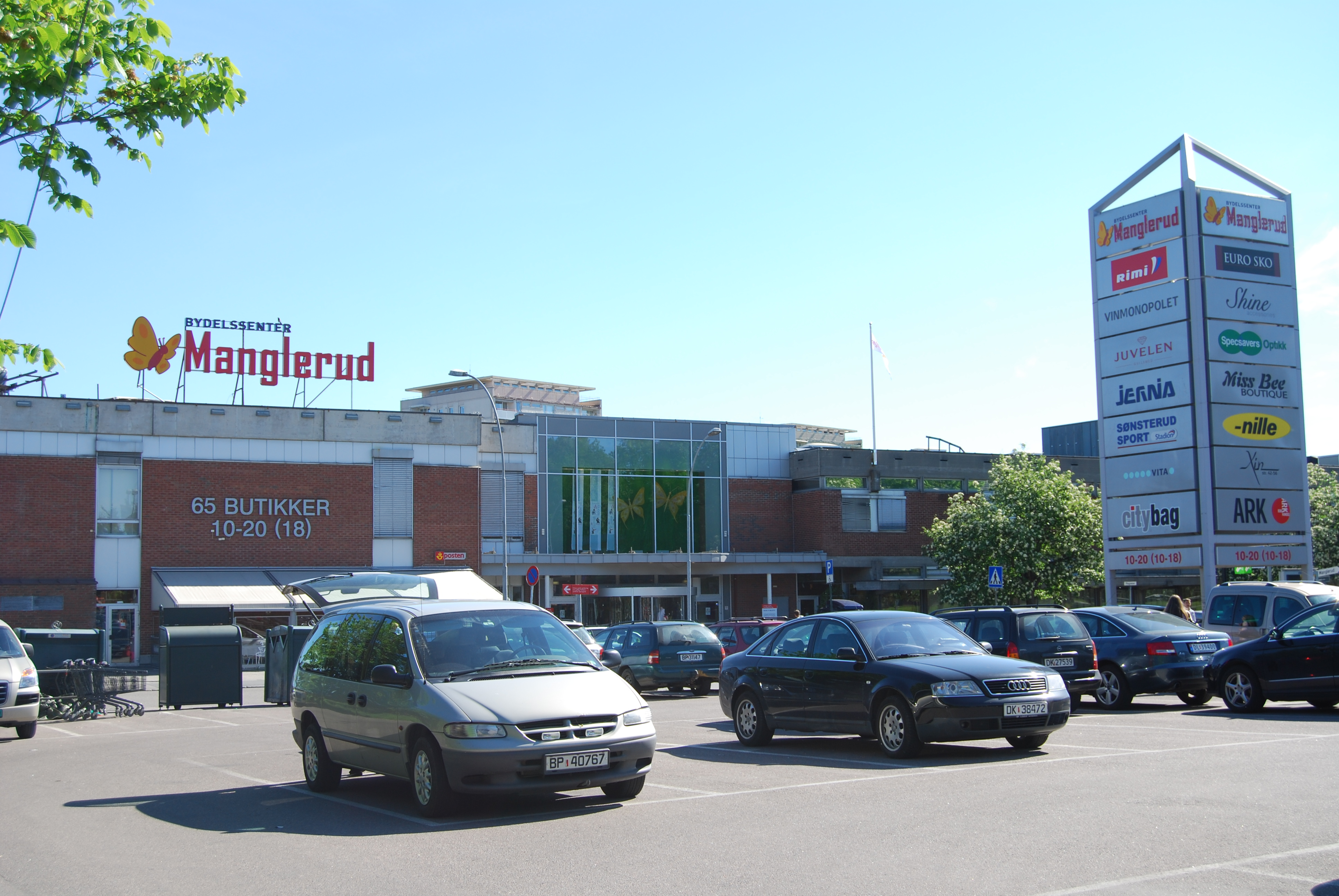 Oslo; Manglerud, Bydelssenter (centrum handlowe) maj 2009 r.